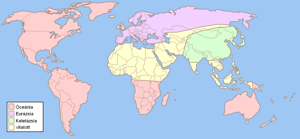 Orwell 1984 című regényének térképe